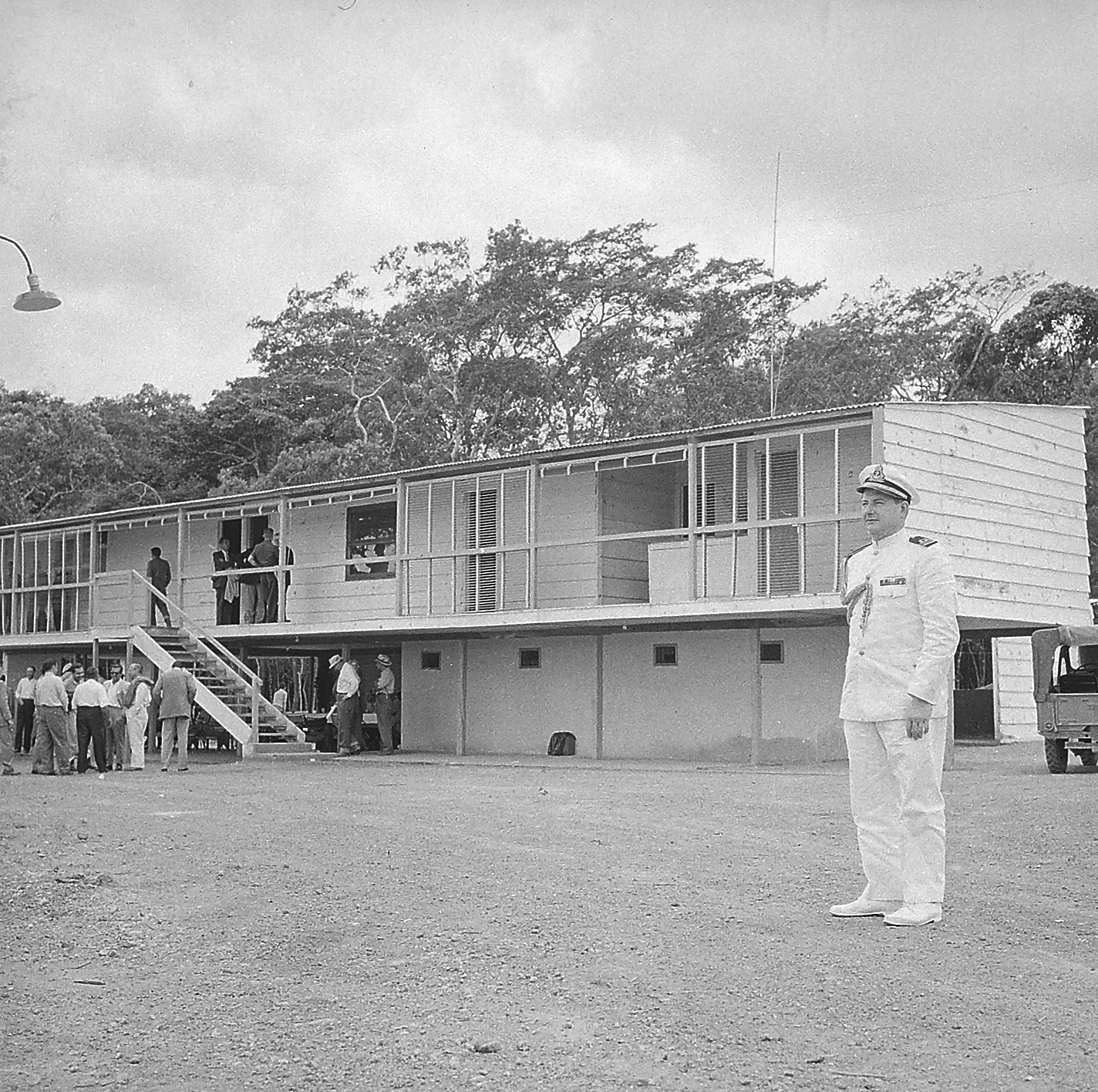 Imagem do Fundo Agência Nacional, do Arquivo Nacional